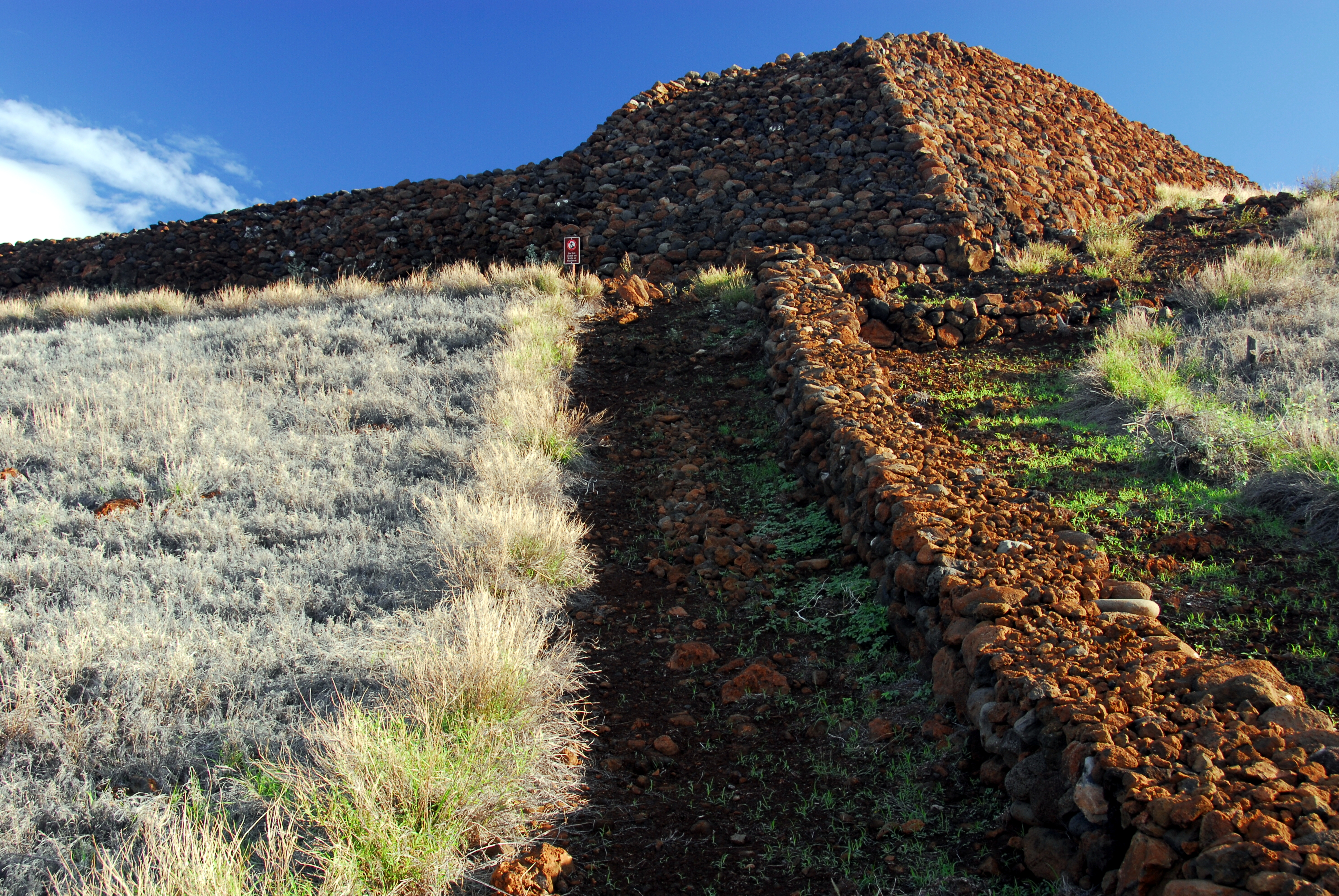 ruins of Pu'ukoholā Heiau